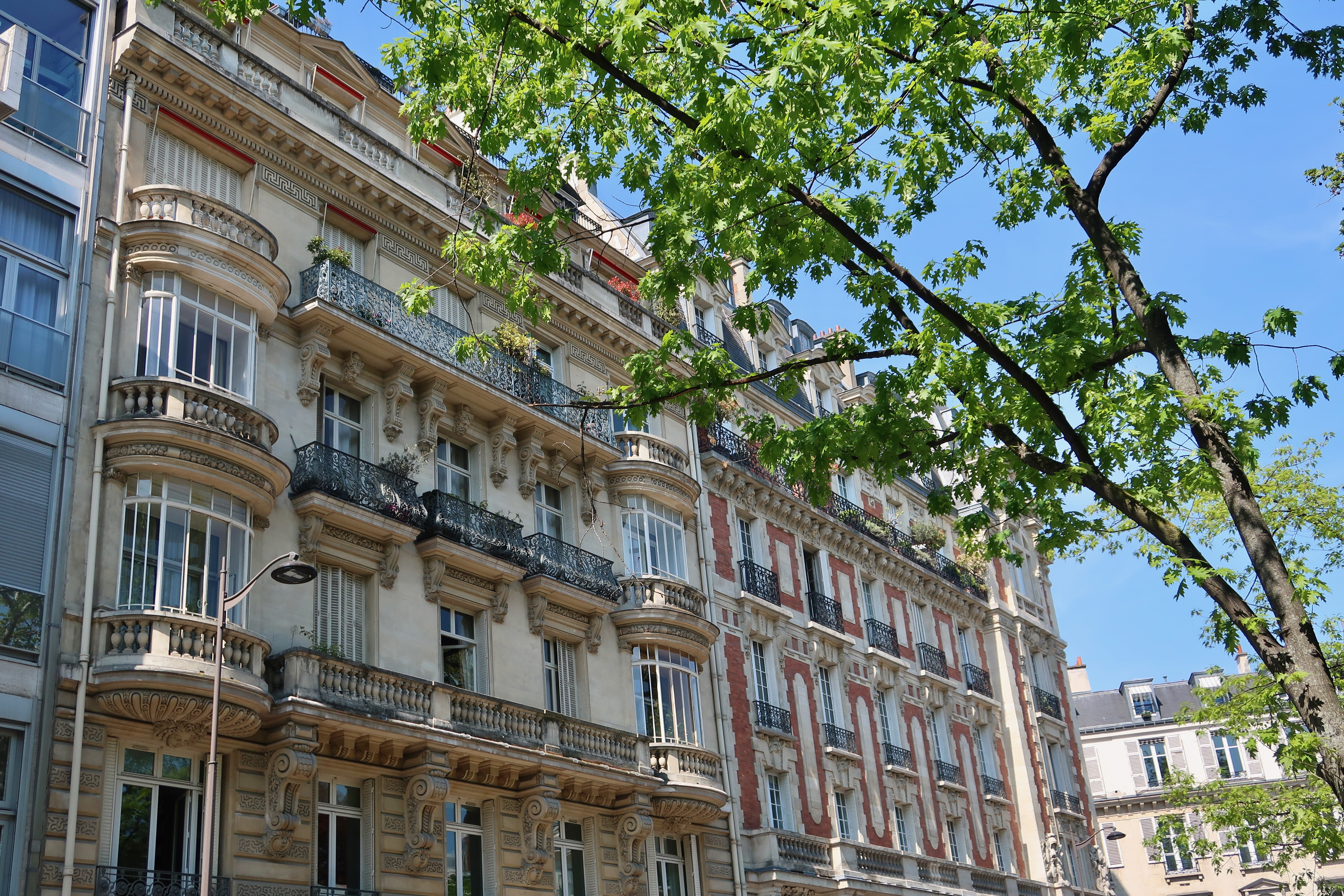 2-4 rue Guynemer (Paris, 6e).